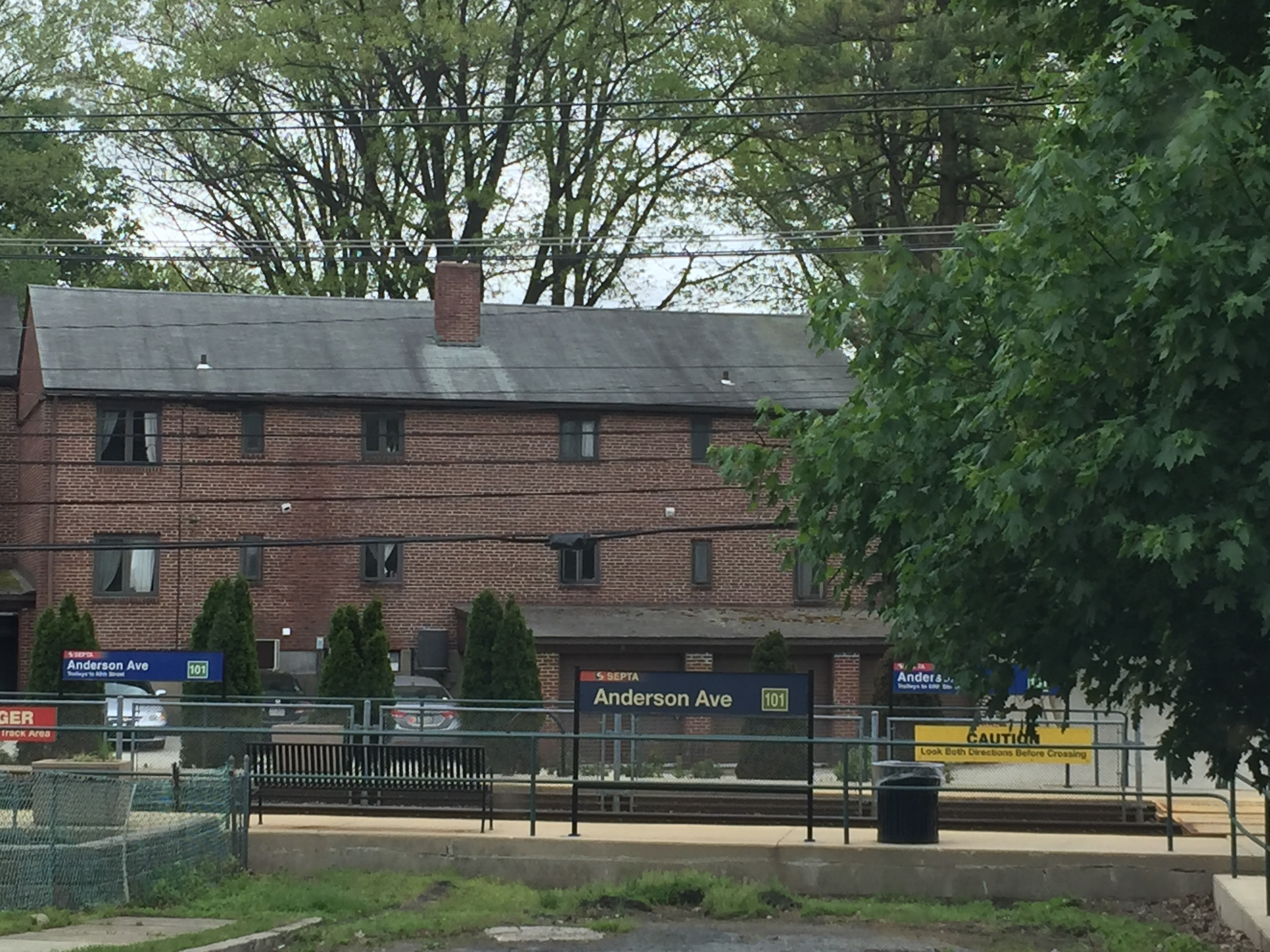 Anderson avenue